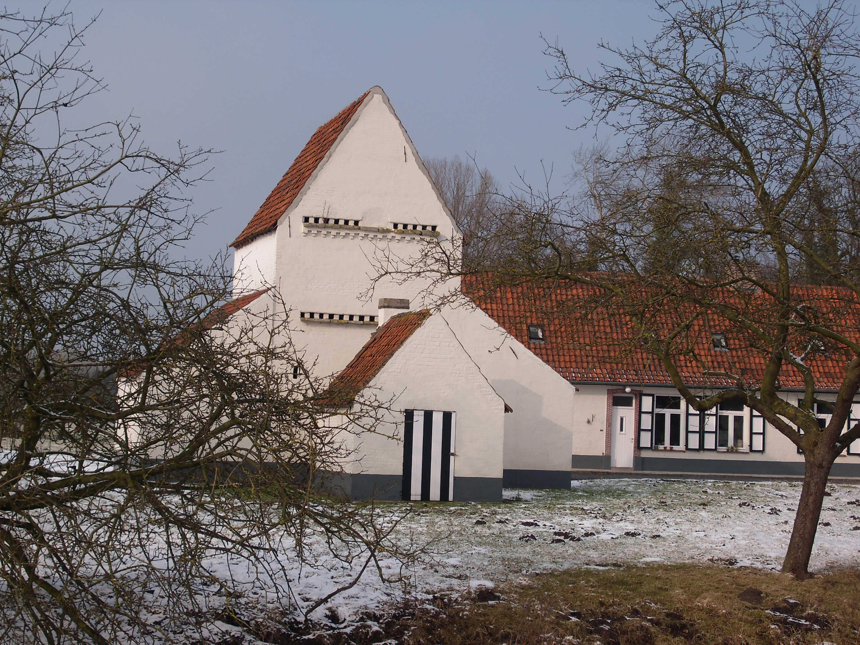 Duiventoren - Beekstraat - Drongen/Mariakerke - Gent - Oost-Vlaanderen - Vlaanderen - België